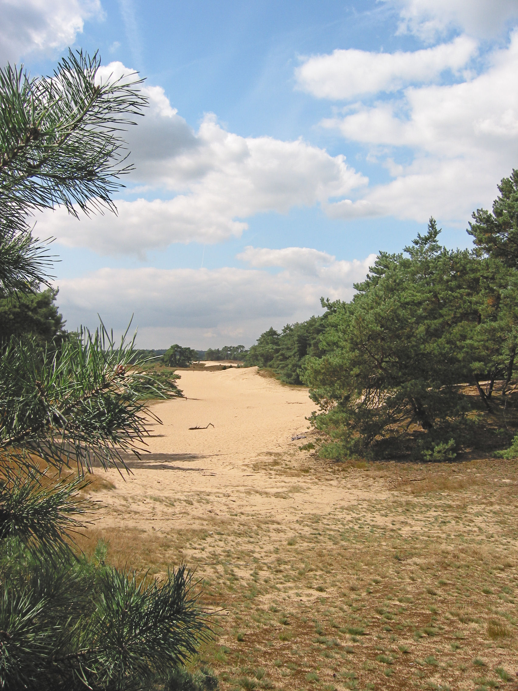 Wekeromse Zand stuifzand